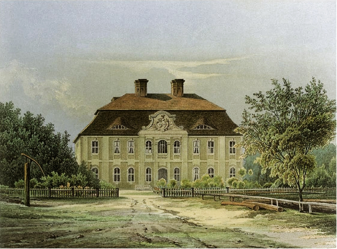 Gutshaus Markendorf, bei Frankfurt (Oder), Kreis Lebus, Provinz Brandenburg